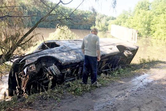 Автомобіль з пестицидами перекинувся у с. Збаржівка